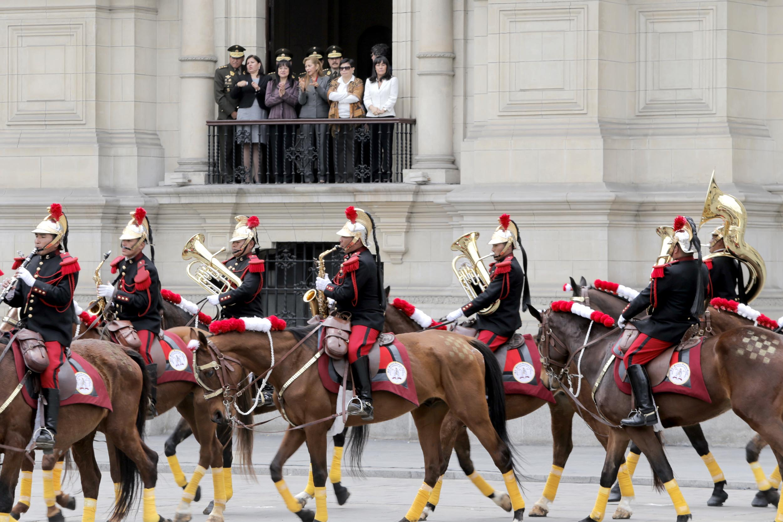 El ministro de Defensa, Pedro Cateriano Bellido, junto al presidente de la República, Ollanta Humala Tasso, el Jefe del Comando Conjunto, Almirante José Cueto y altos mandos de los Institutos Armados, presiden la ceremonia de cambio de guardia en Palacio de Gobierno.